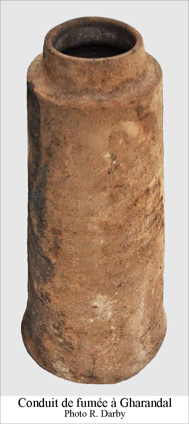 Conduit en terre cuite pour évacuation des fumées du chauffage d'un l’hypocauste.